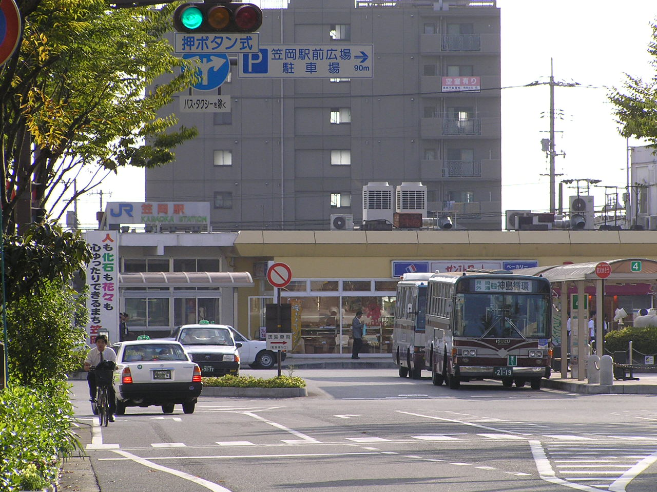 kasaoka station square